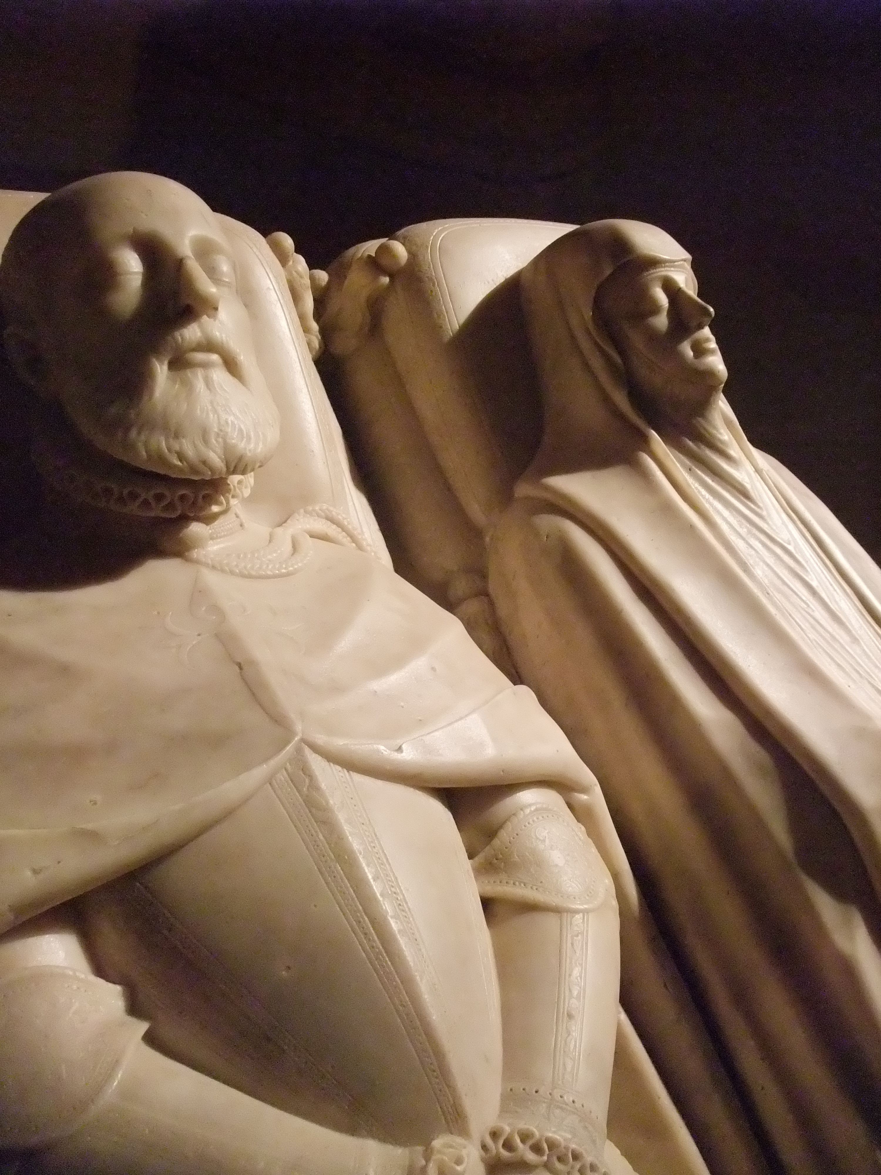 San Sebastián (Guipúzcoa)-Museo de San Telmo-6-Sepulcro de Alonso de Idiáquez y Gracia de Olazábal